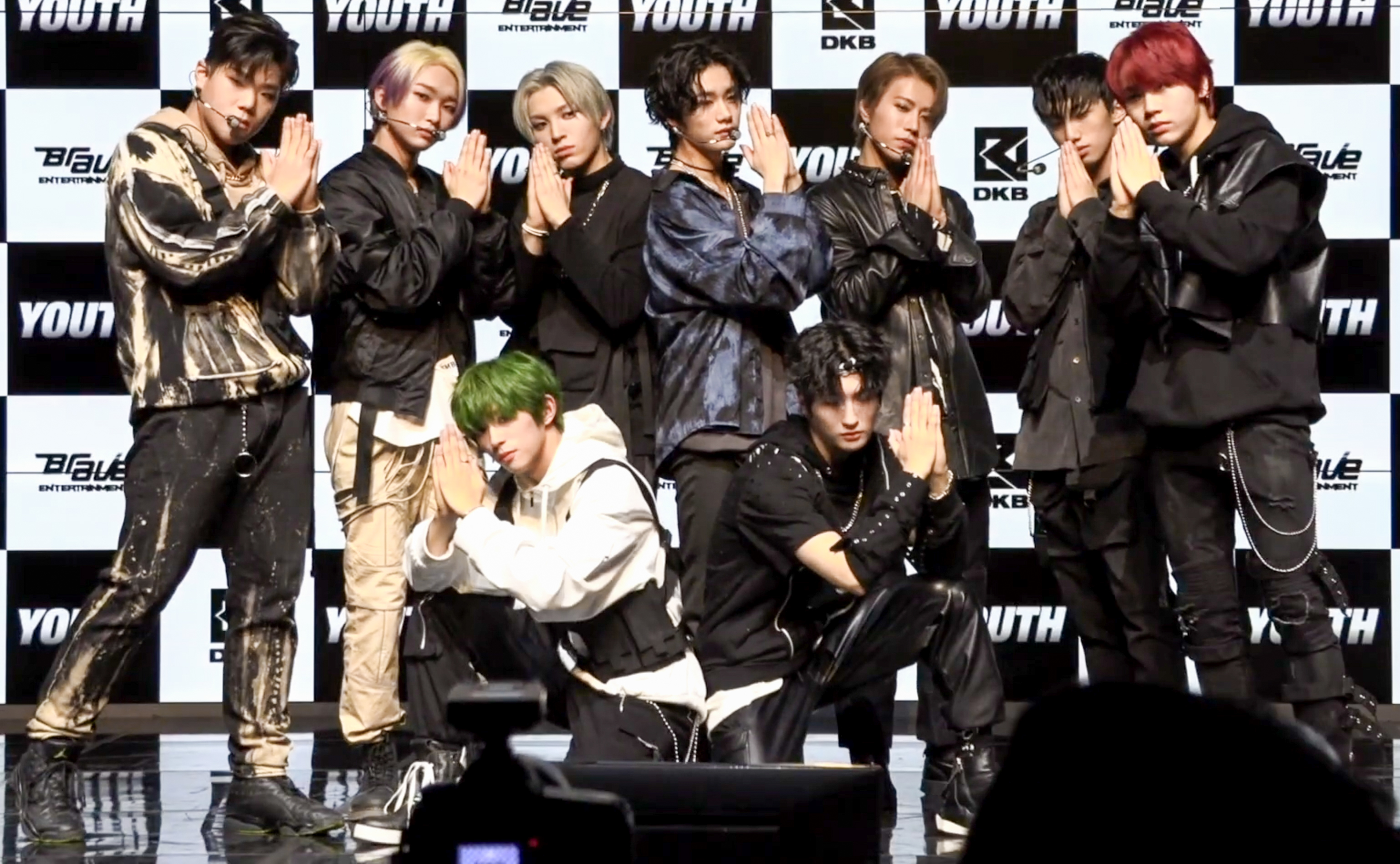 #다크비 #DKB #쏘리마마 #SorryMama #Youth #이찬 #D1 #테오 #GK #희찬 #룬 #준서 #유쿠 #해리준 보이그룹 다크비(DKB)가 가요계에 정식으로 데뷔했다. 3일 오후 서울 강남구 슈피겐홀에서 다크비의 데뷔앨범 ‘Youth’(유스) 쇼케이스가 열렸다. 타이틀 ‘미안해 엄마 (Sorry Mama)’(쏘리 마마)는 브레이브엔터테인먼트의 수장 용감한 형제를 주축으로, 레드쿠키와 다크비 멤버들의 공동작업으로 탄생한 EDM TRAP(이디엠 트랩) 장르 기반의 힙합 댄스곡이다. 이외에도 데뷔앨범에는 인트로 ‘YOUTH’와 다크비의 설렘과 꿈을 표현한 ‘Go Up’(고 업), 계속해서 성장하겠다는 목표를 담은 ‘Elevator’(엘리베이터), Flex(플렉스)한 주제를 재치 있게 풀어낸 ‘Samsung’(삼성)이 수록됐다. 특히 ‘Youth’는 다크비 4부작 시리즈의 서막을 여는 앨범으로, 앞으로 나아가는 멤버들의 열정 가득한 모습을 다채롭게 표현했다. 브레이브엔터테인먼트에서 7년 만에 선보이는 9인조 신인 다크비는 이찬과 D1, 테오, GK, 희찬, 룬, 준서, 유쿠, 해리준으로 구성됐다. 팀명은 ‘Dark Brown Eyes’(다크 브라운 아이즈)의 줄임말로, 검은 눈동자를 가진 멤버들이 음악을 통해 전 세계로 뻗어 나가겠다는 포부도 담고 있다. 작사와 작곡, 안무 창작, 아크로바틱, 디제잉 등 제작에도 참여하며 아티스트형 그룹의 탄생을 알린 다크비는 ‘차세대 슈퍼 루키’로 활약할 것을 예고했다.